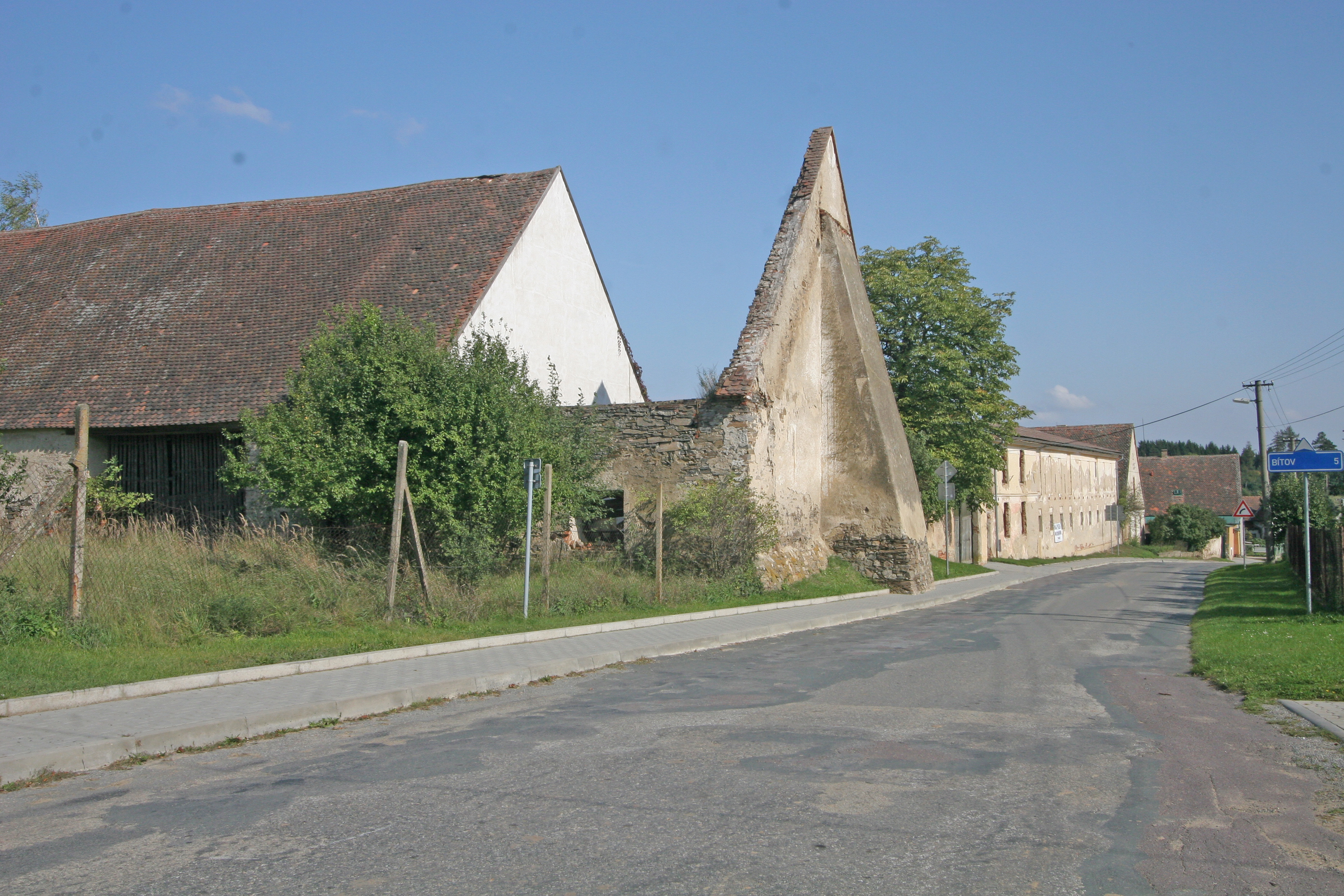 Panský dvůr s areálem, Vysočany 48, Vysočany (okres Znojmo).